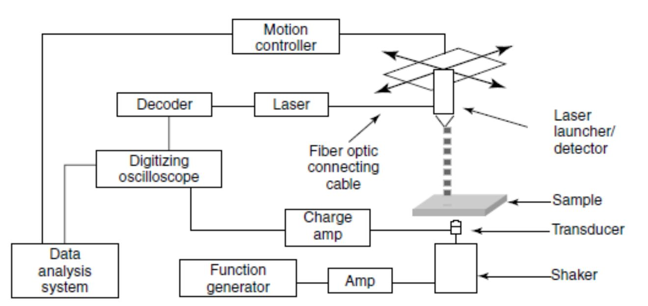 Schematic diagram of an impact acoustic resonance setup used to obtain resonant frequencies of ceramic composite components